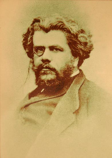 Павел Петрович Вяземский (1820-88) — князь, российский археограф и историк литературы.